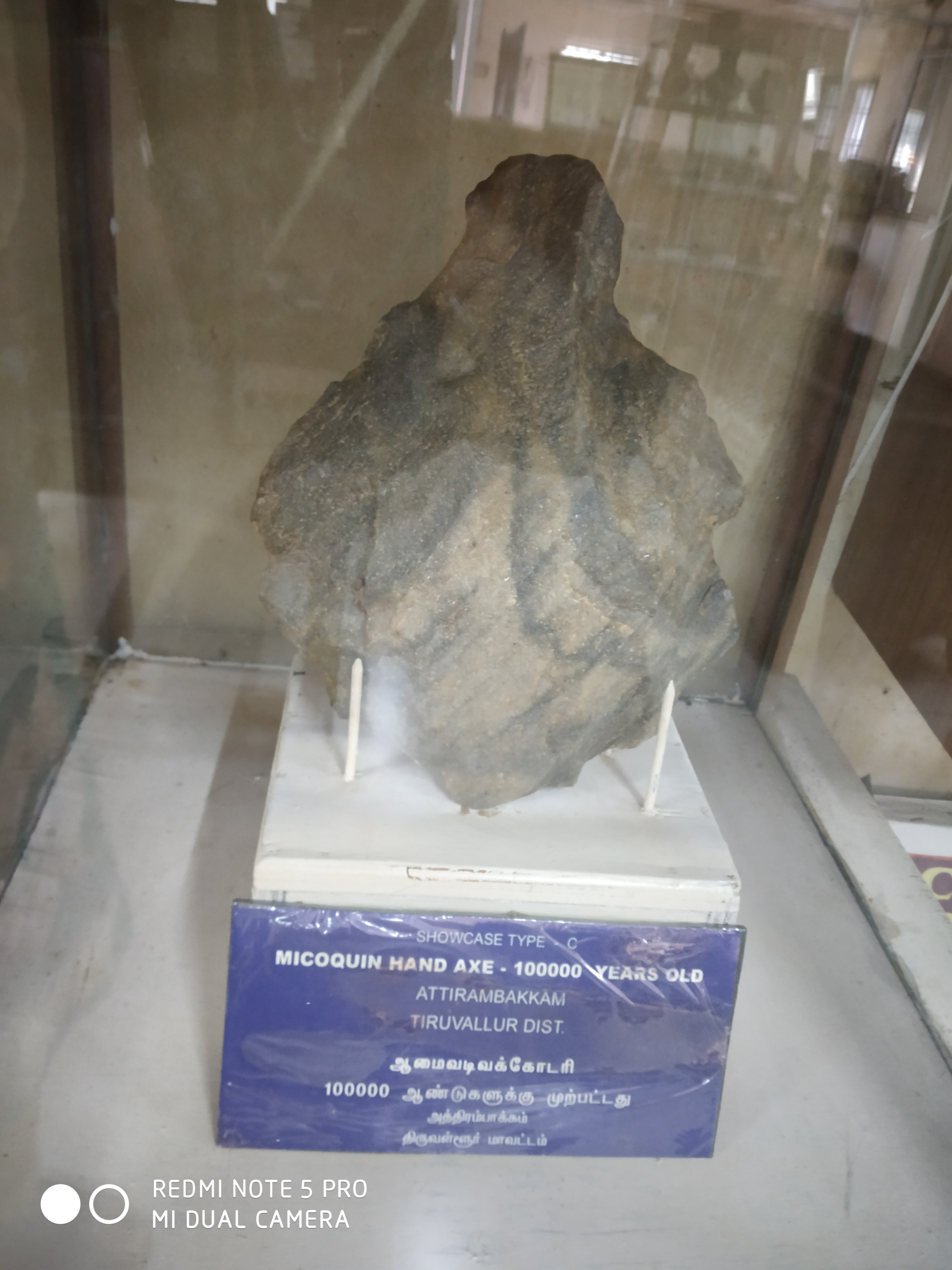 ஆமை வடிவ கைக்கோடரி